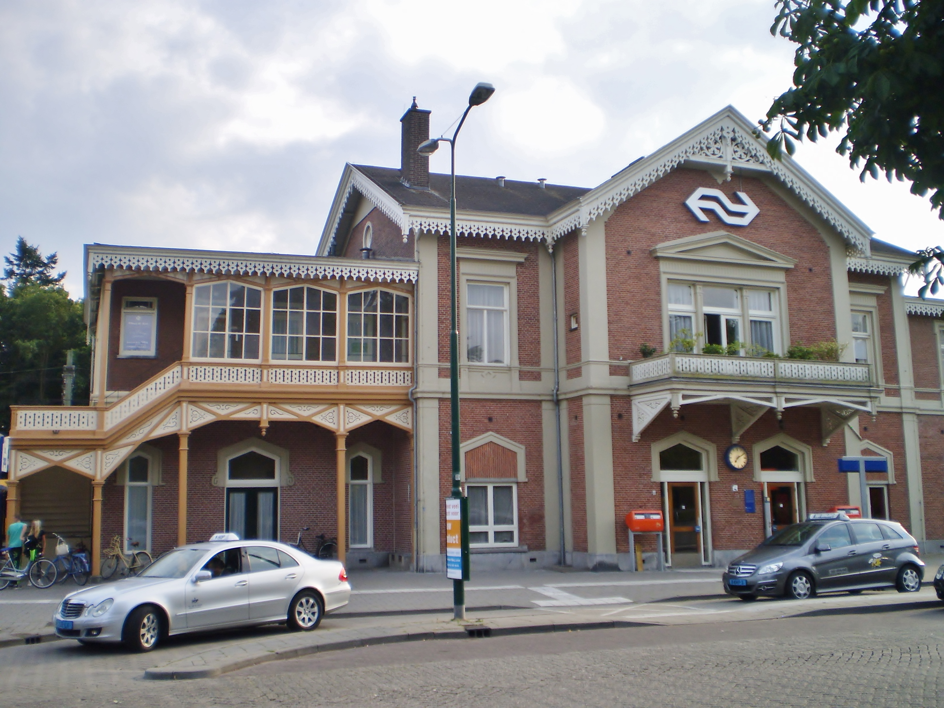 Station met links de gerenoveerde koninklijke wachtkamer